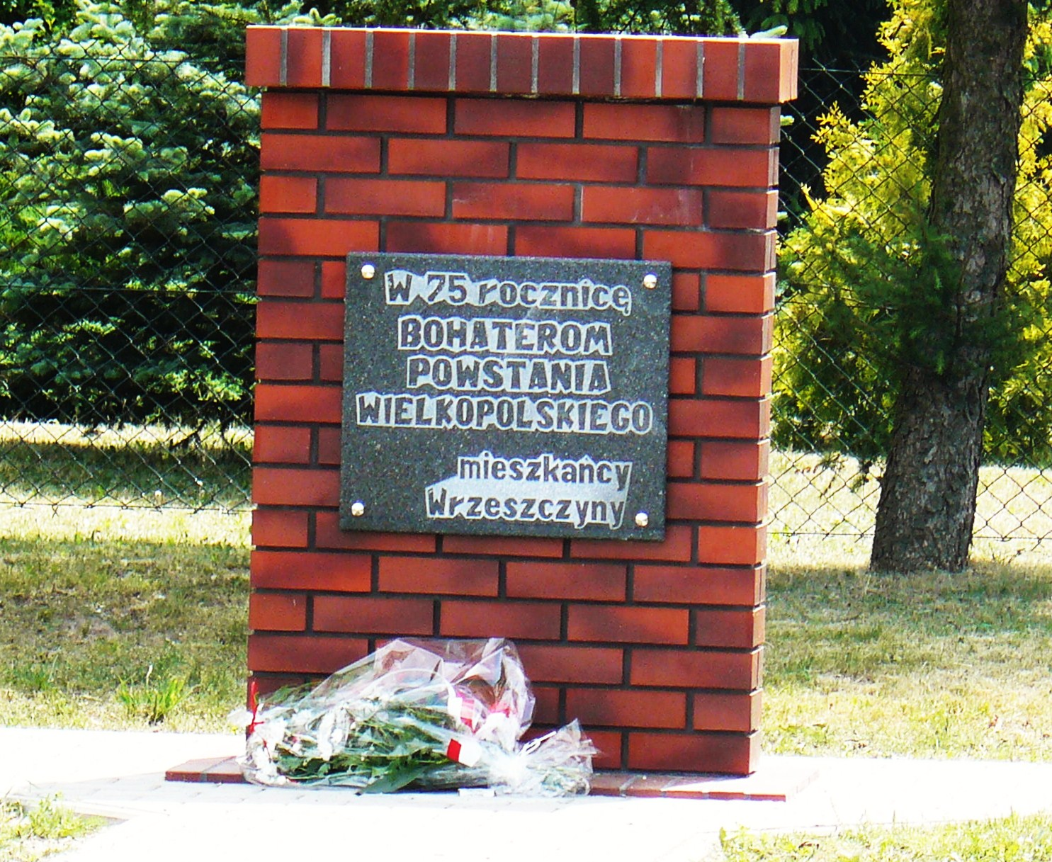 Wrzeszczyna. Gmina Wieleń.